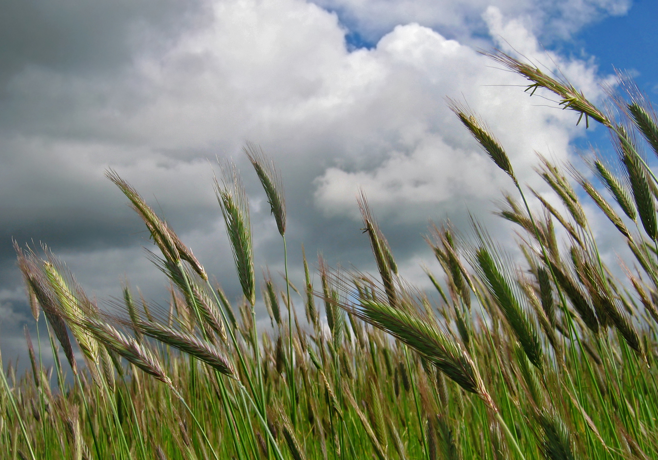 Rukki pähikud tolmukatega